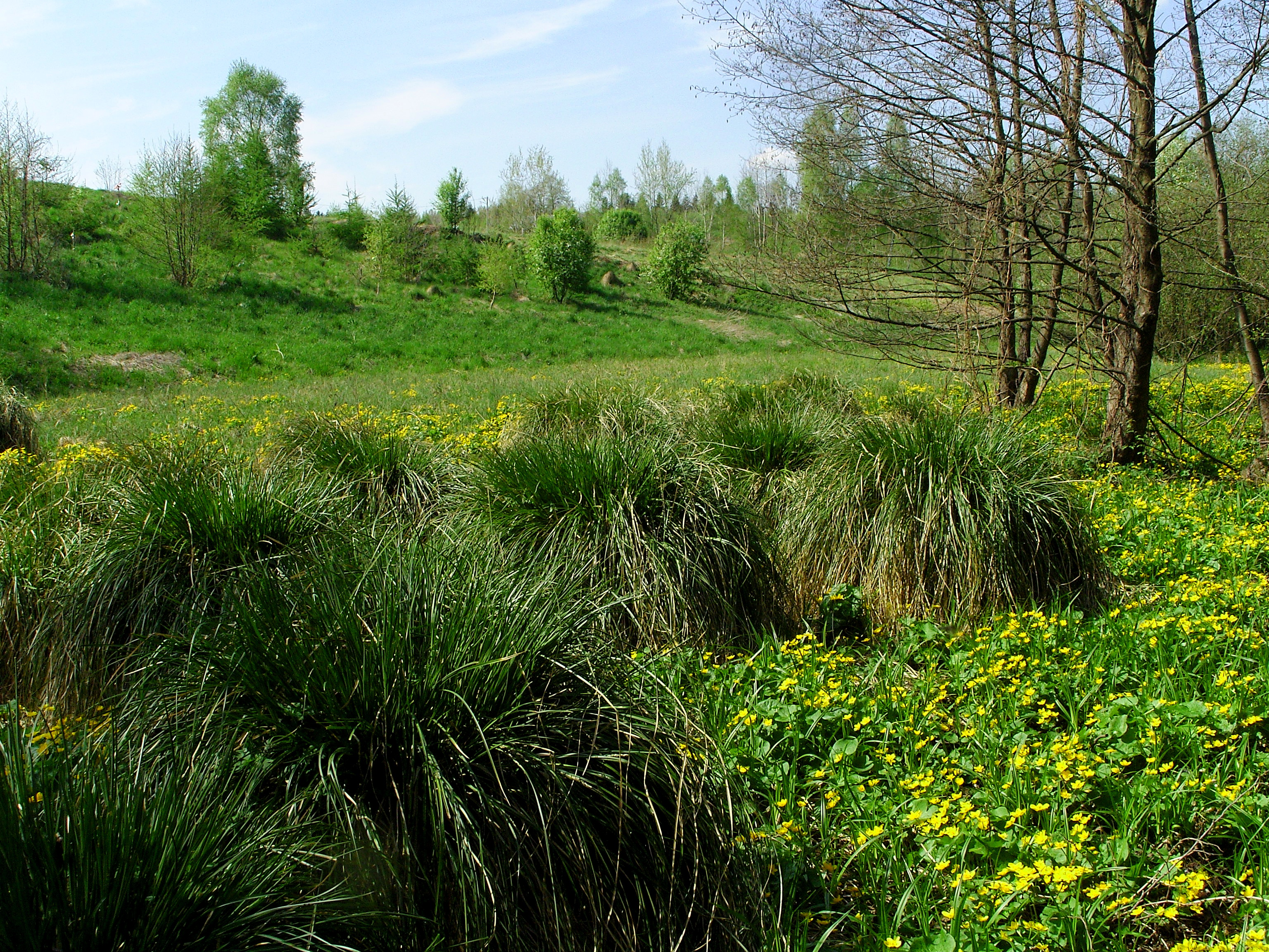 siedlisko łąkowe w Bączalu Górnym